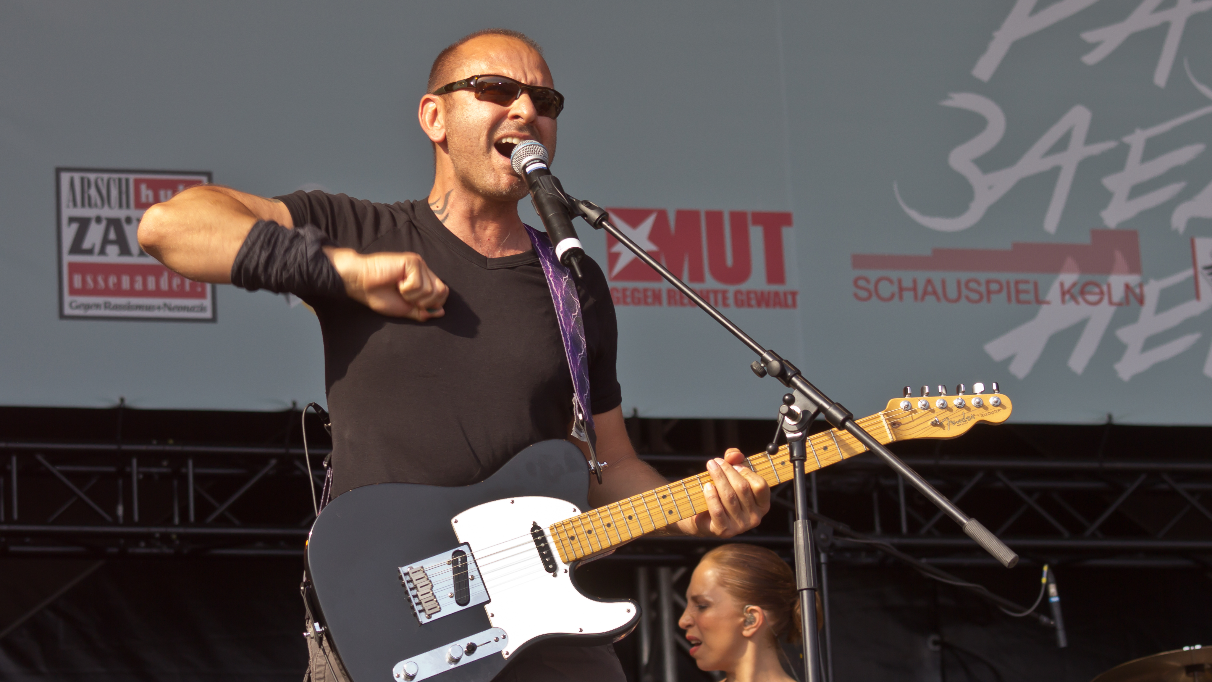 Birlikte - Kundgebung - Sertab Erener und Demir Demirkan Foto: Demir Demirkan